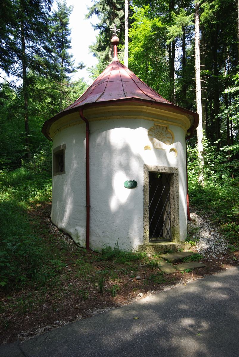 Marienkapelle am Johannishögl, AußenansichtThis is a photograph of an architectural monument.